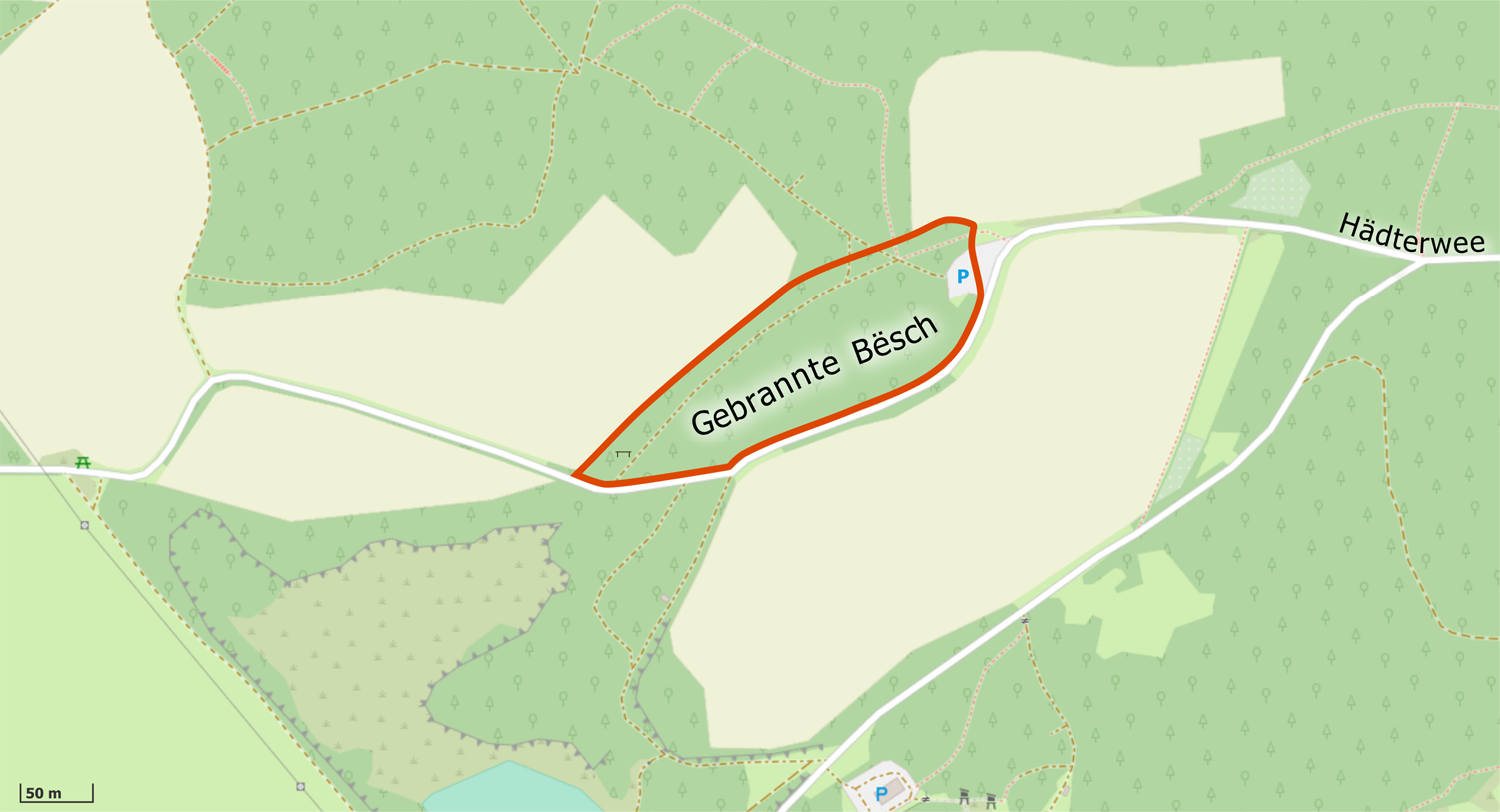 Koart vu Rëmeleng op deer de Flouer "Gebrannte Bësch" ervirgehuewen ass.